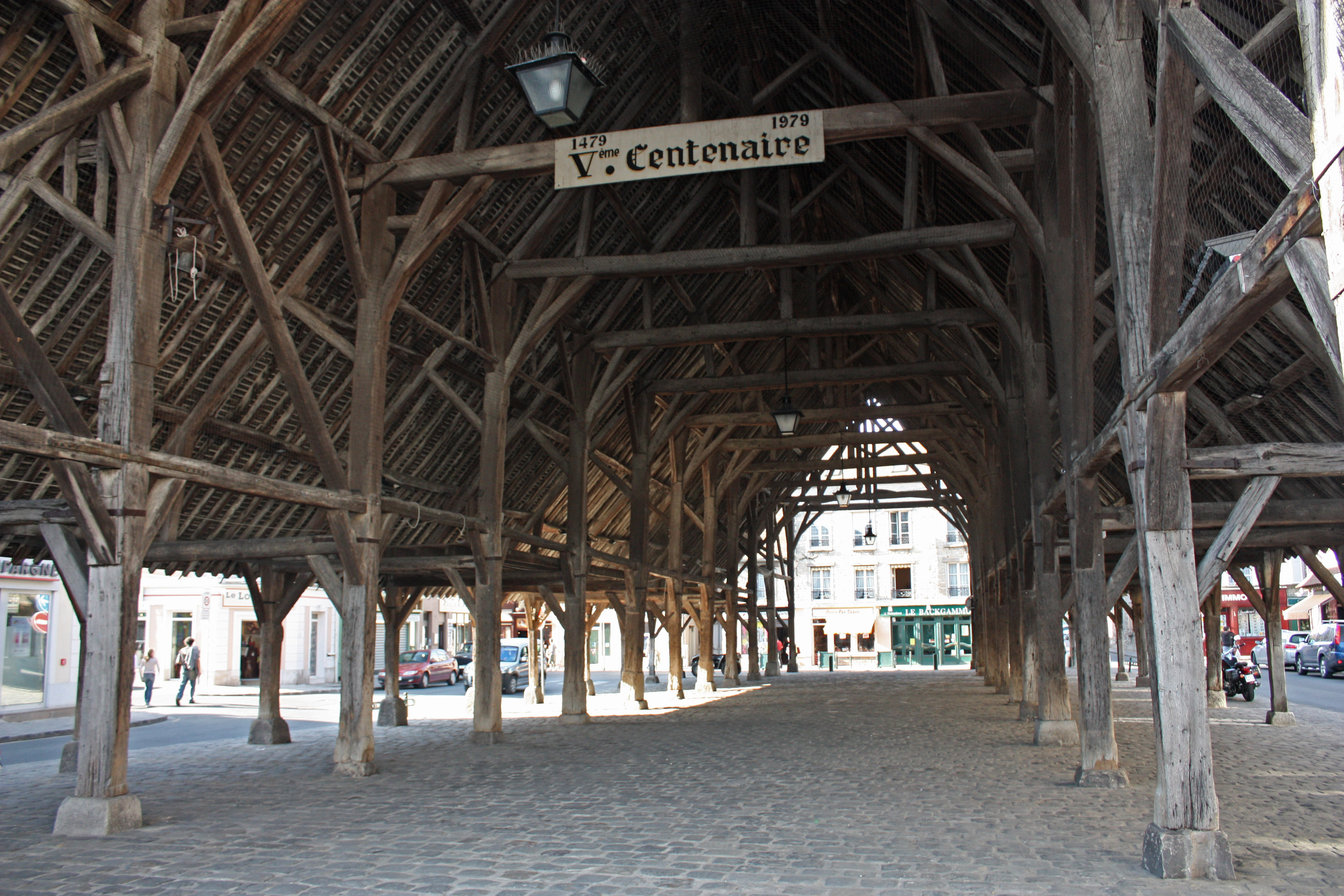 La charpente des halles repose sur 48 piliers de chêne posés sur des socles de pierres pour les protéger lors des lavages à grandes eaux.